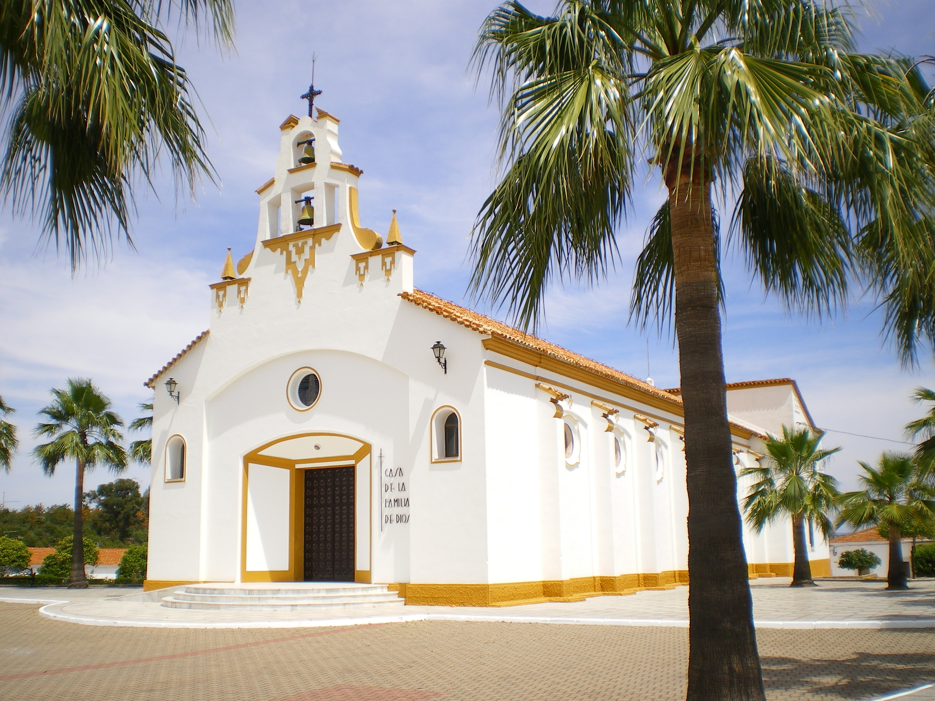 Iglesia de Tharsis